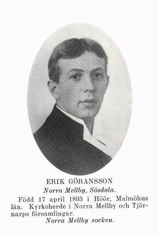 Norra Mellby gamla prästgård, nedmonterat 1928 och flyttad till Broby Hembygdspark